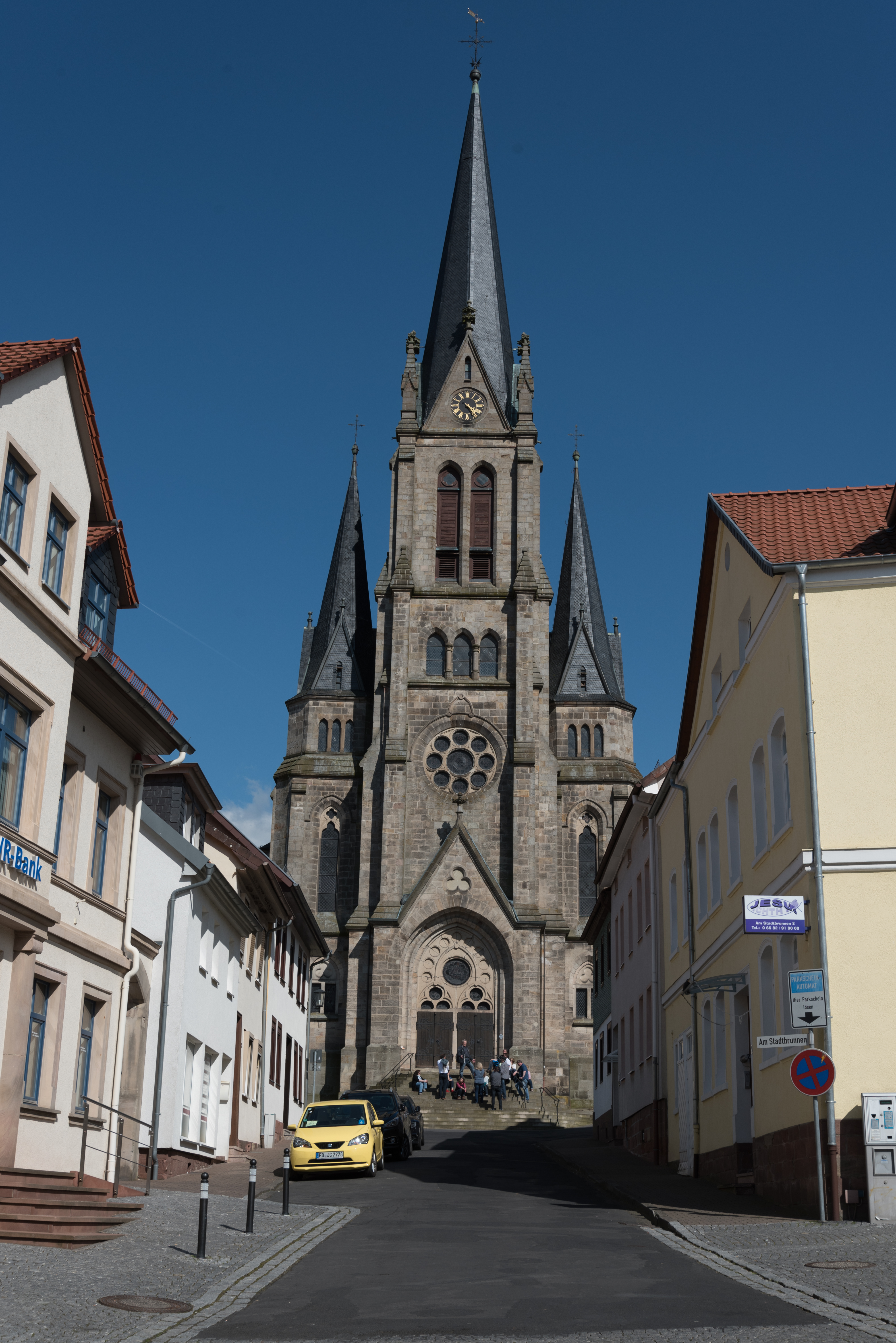 Tann (Rhön), Ev. Stadtpfarrkirche